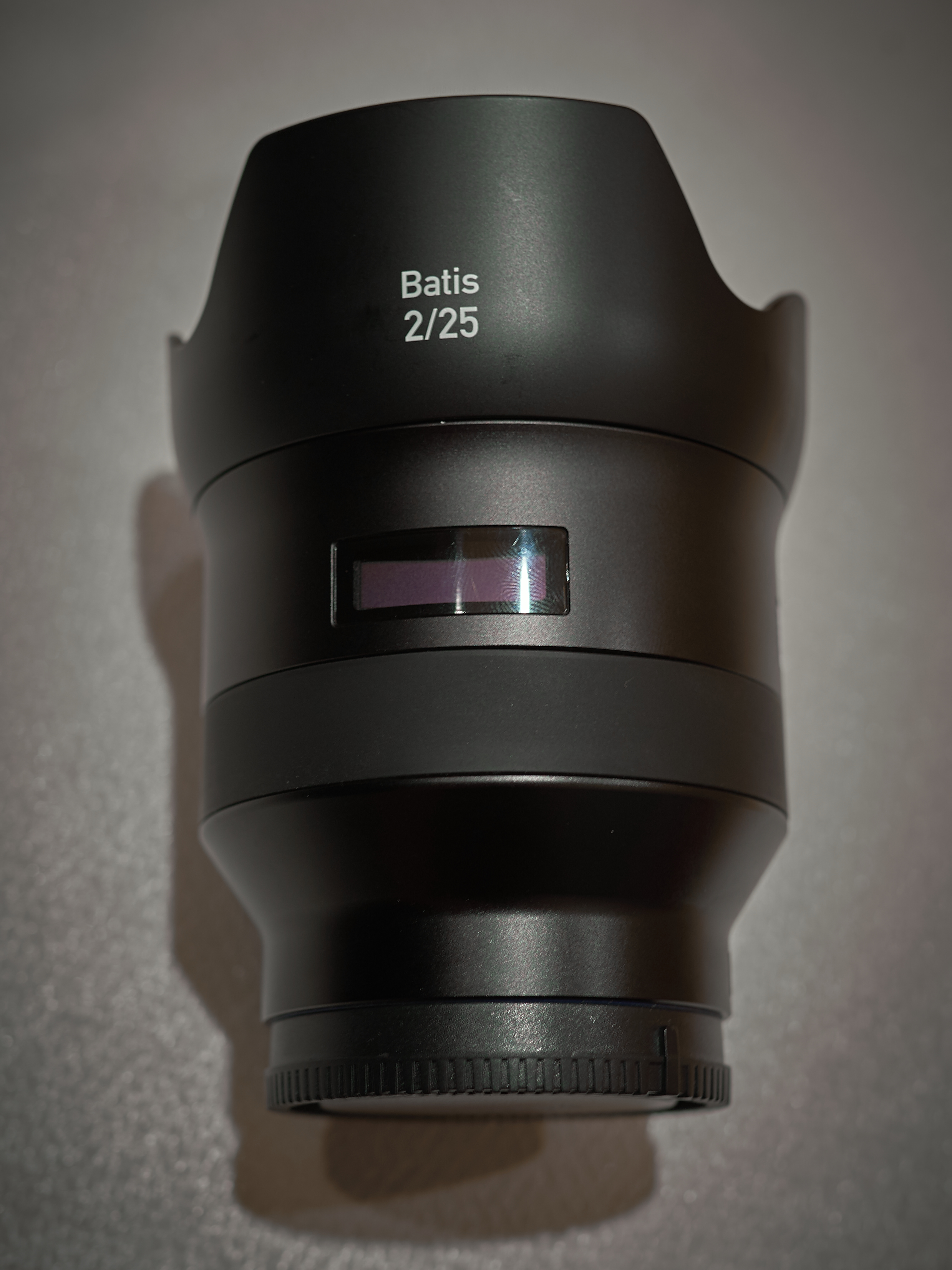 Zeiss Batis f/2 25 mm